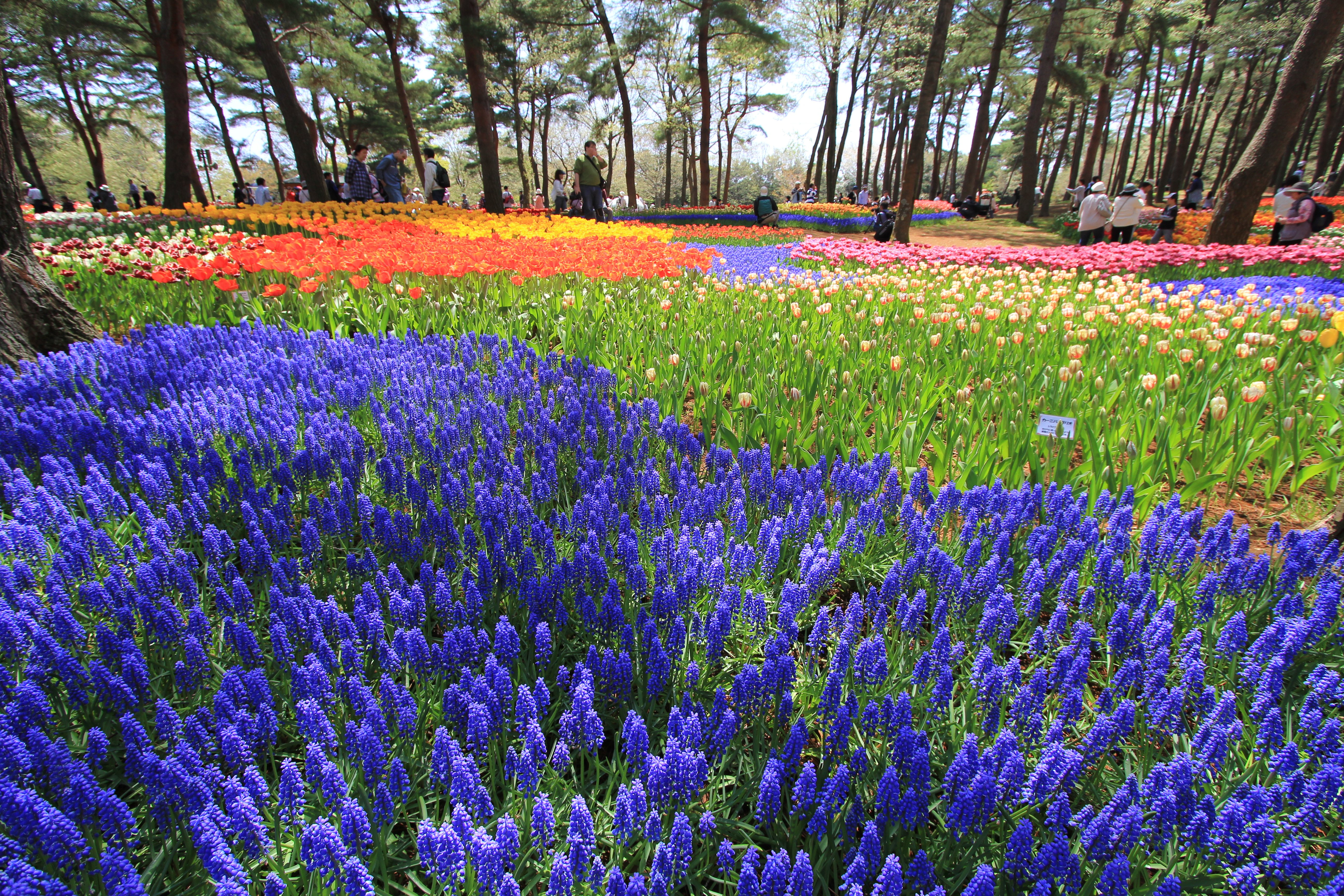 ひたち海浜公園